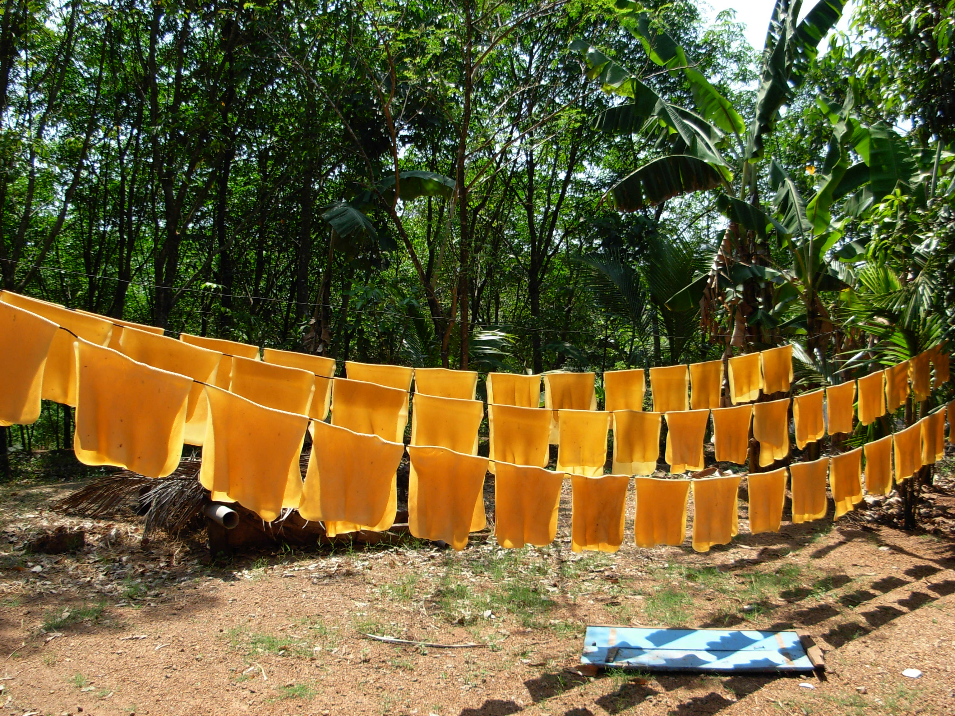 ഉണക്കാനിട്ടിരിക്കുന്ന റബർ ഷീറ്റുകൾ